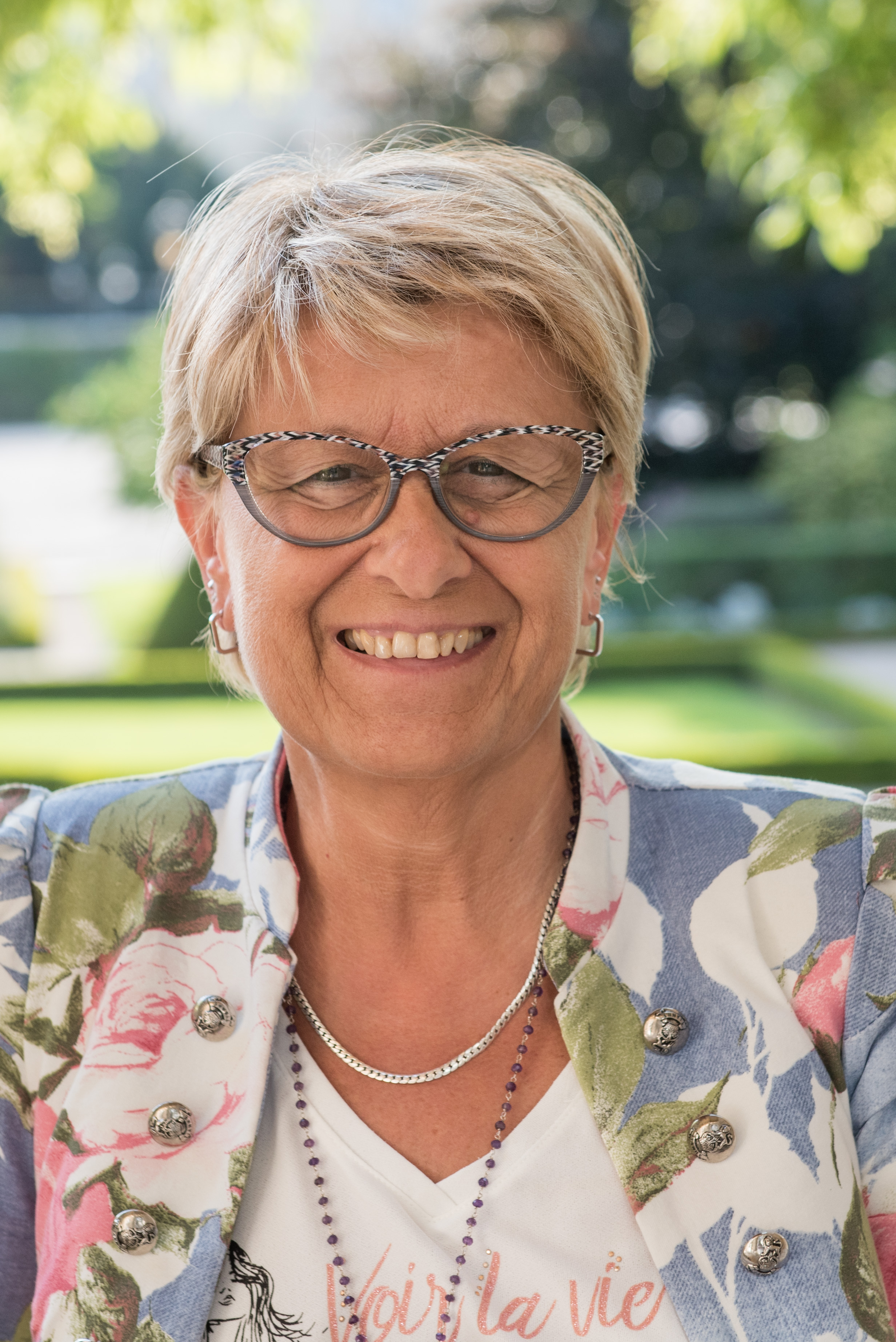 Josy Poueyto dans le jardin des Quatre colonnes du palais Bourbon en 2017.